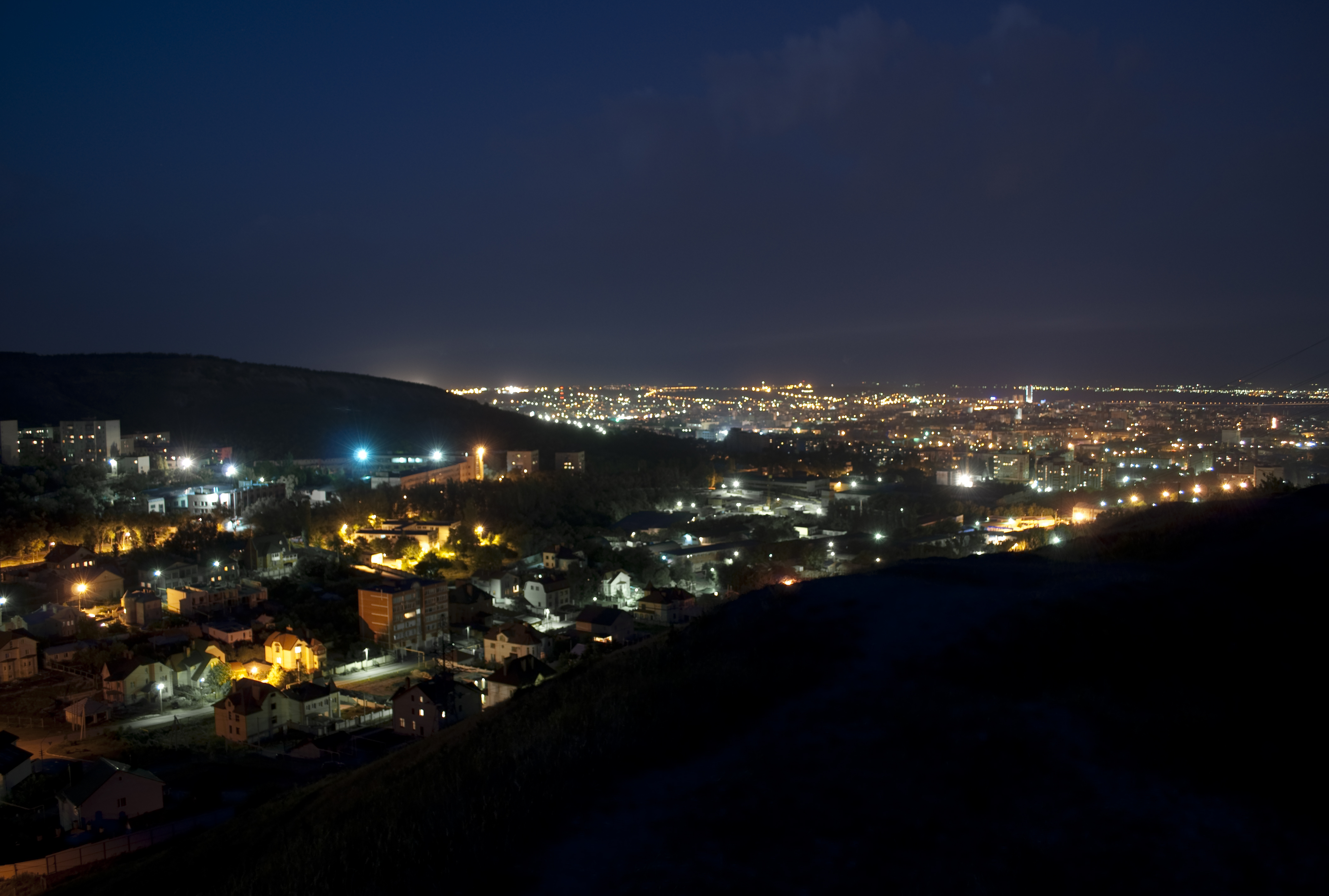 Вид на ночной город со стороны Смирновского ущелья